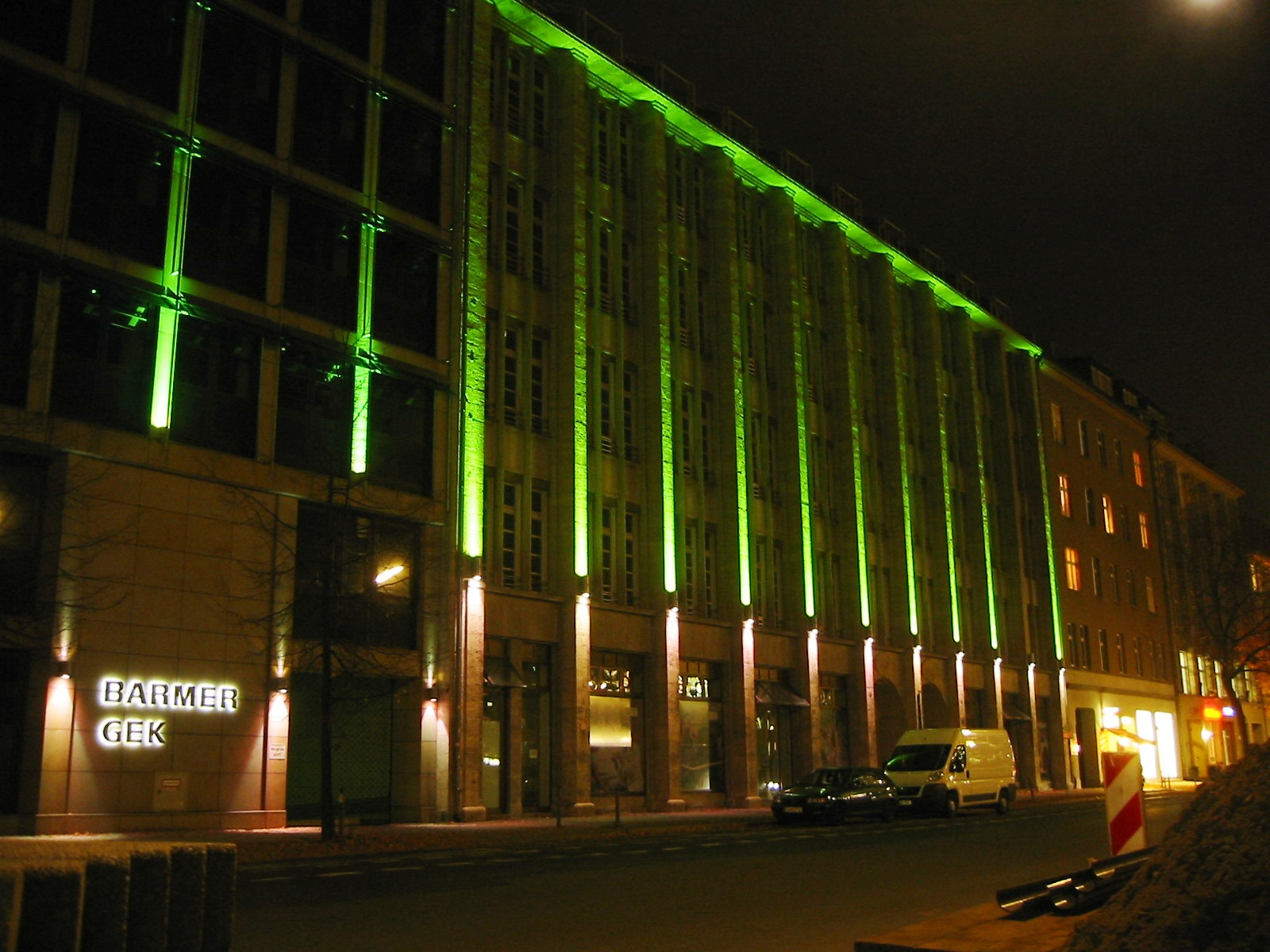 Denkmalgeschützter Bau "Ort der Erinnerung" in der Axel-Springer-Straße in Berlin-Kreuzberg. Das Gebäude wird von der Barmer GEK genutzt.